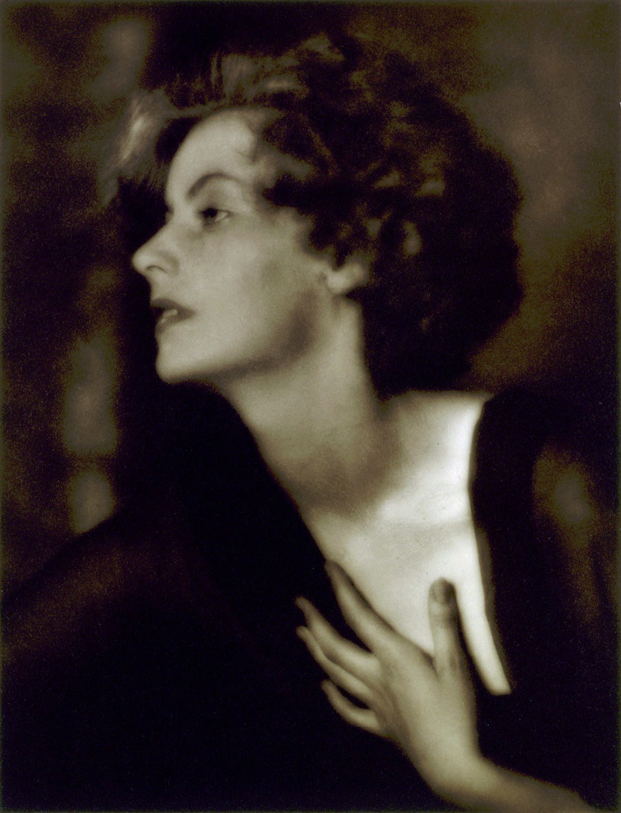 Greta Garbo, actress.